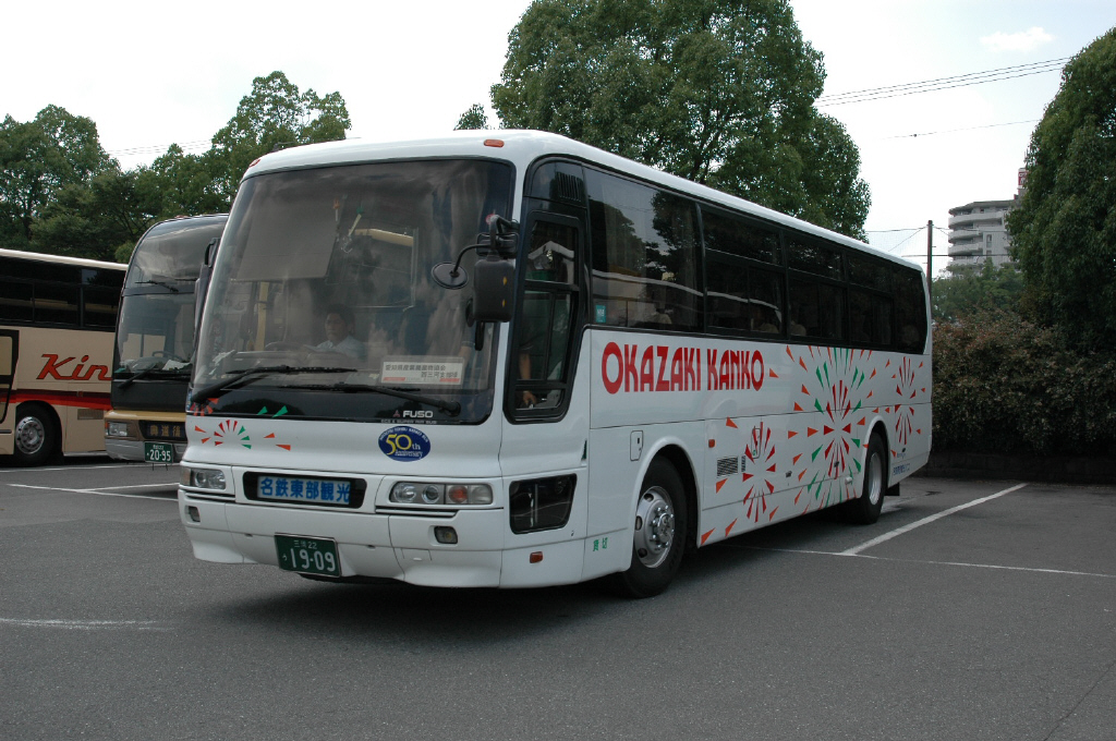 姫路城貸切バス駐車場にて 2004-7-12撮影